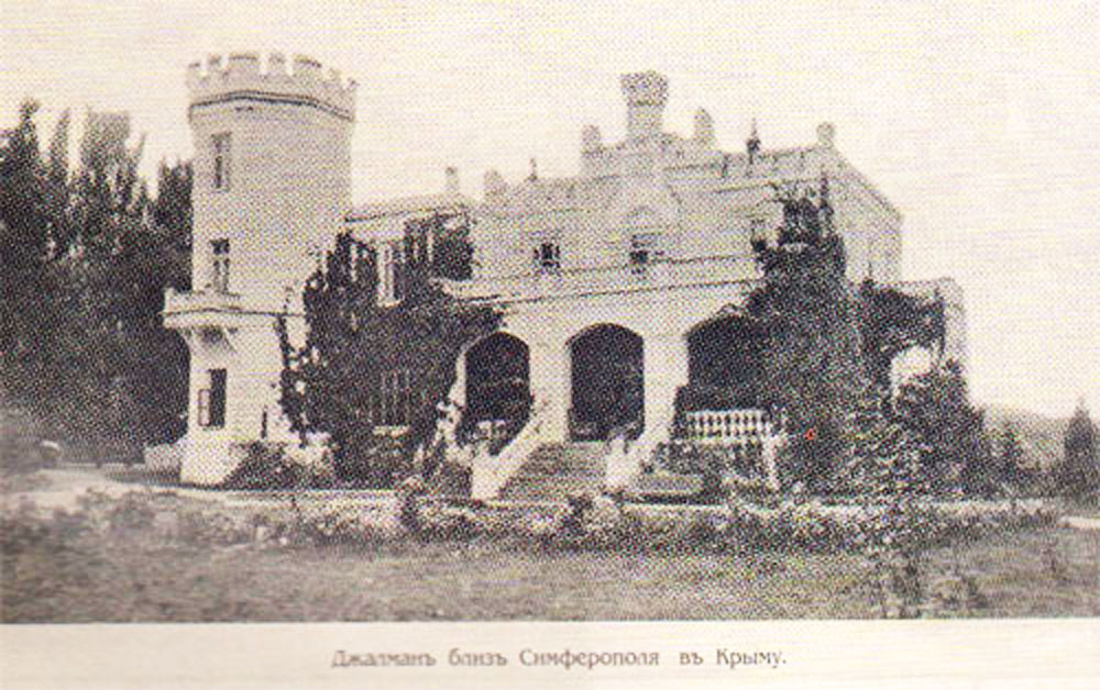 Усадьба Монжене, Крым.